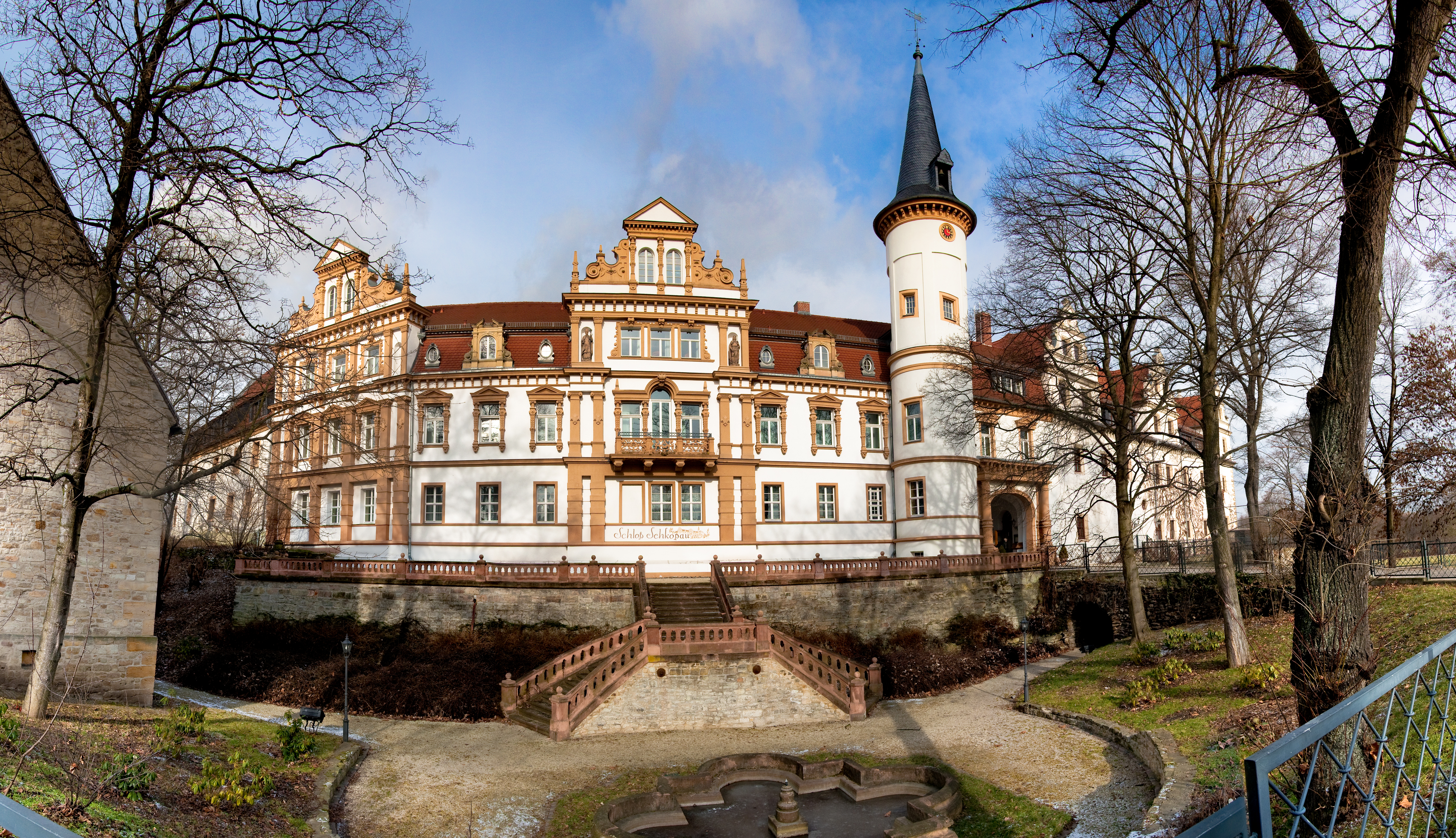 Schloss Schkopau